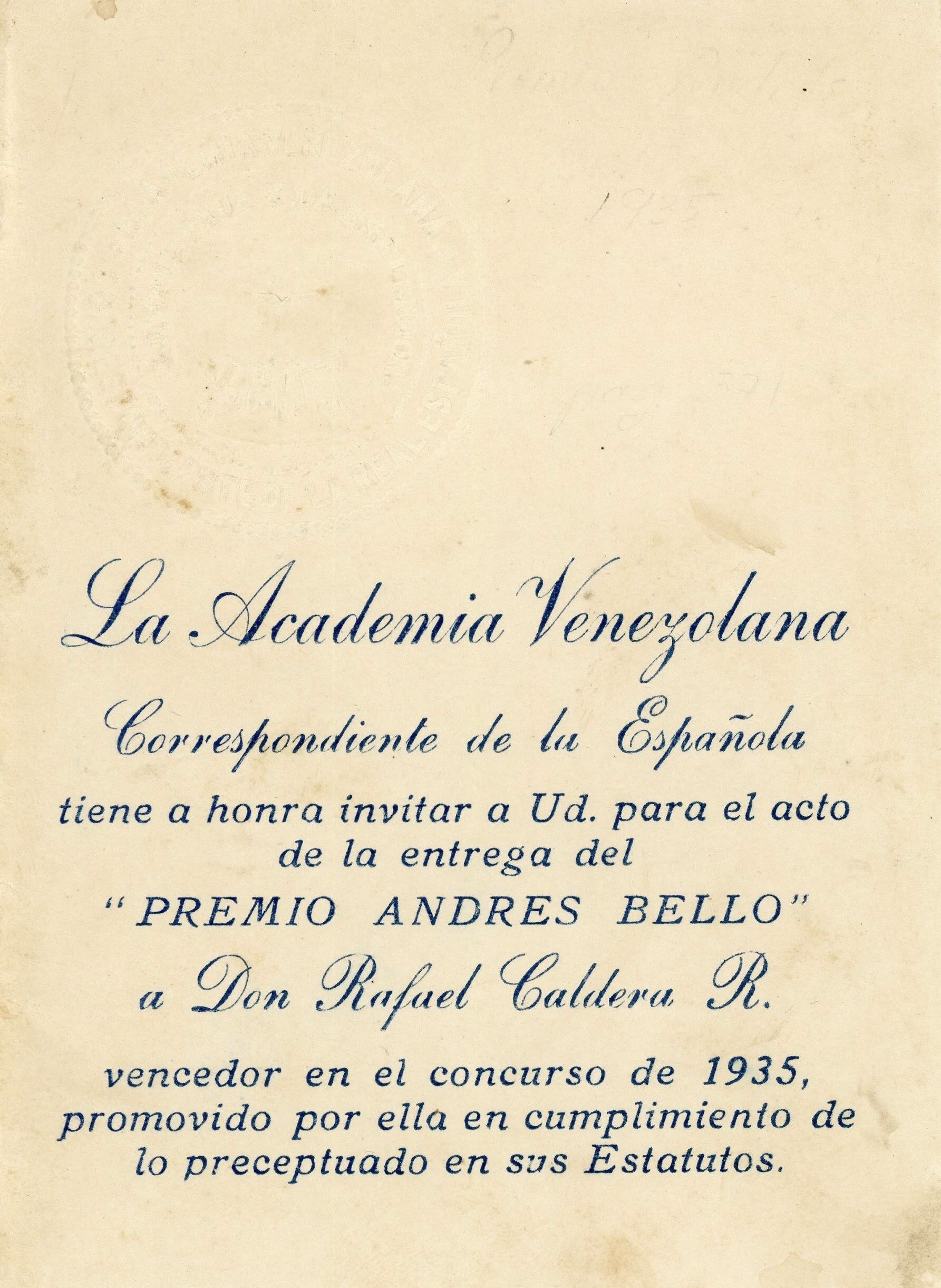 Invitación a la primera edición del Premio Andrés Bello de la Academia Venezolana de la Lengua, otorgado en 1935a Rafael Caldera.